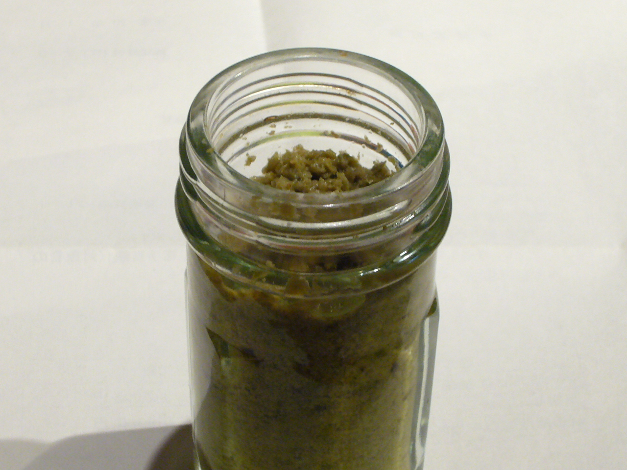 瓶詰めした柚子胡椒